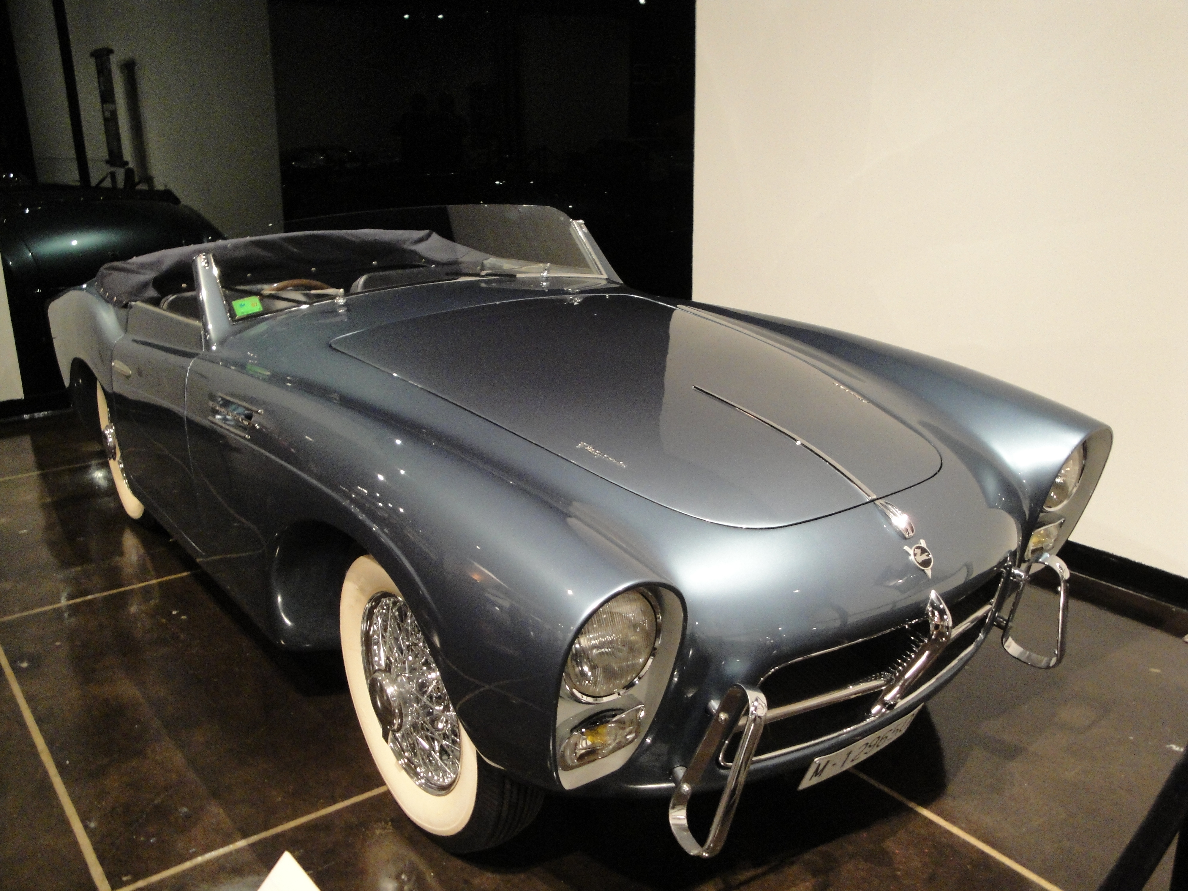 Pegaso Z-102 Cabriolet Saoutchik Series 2